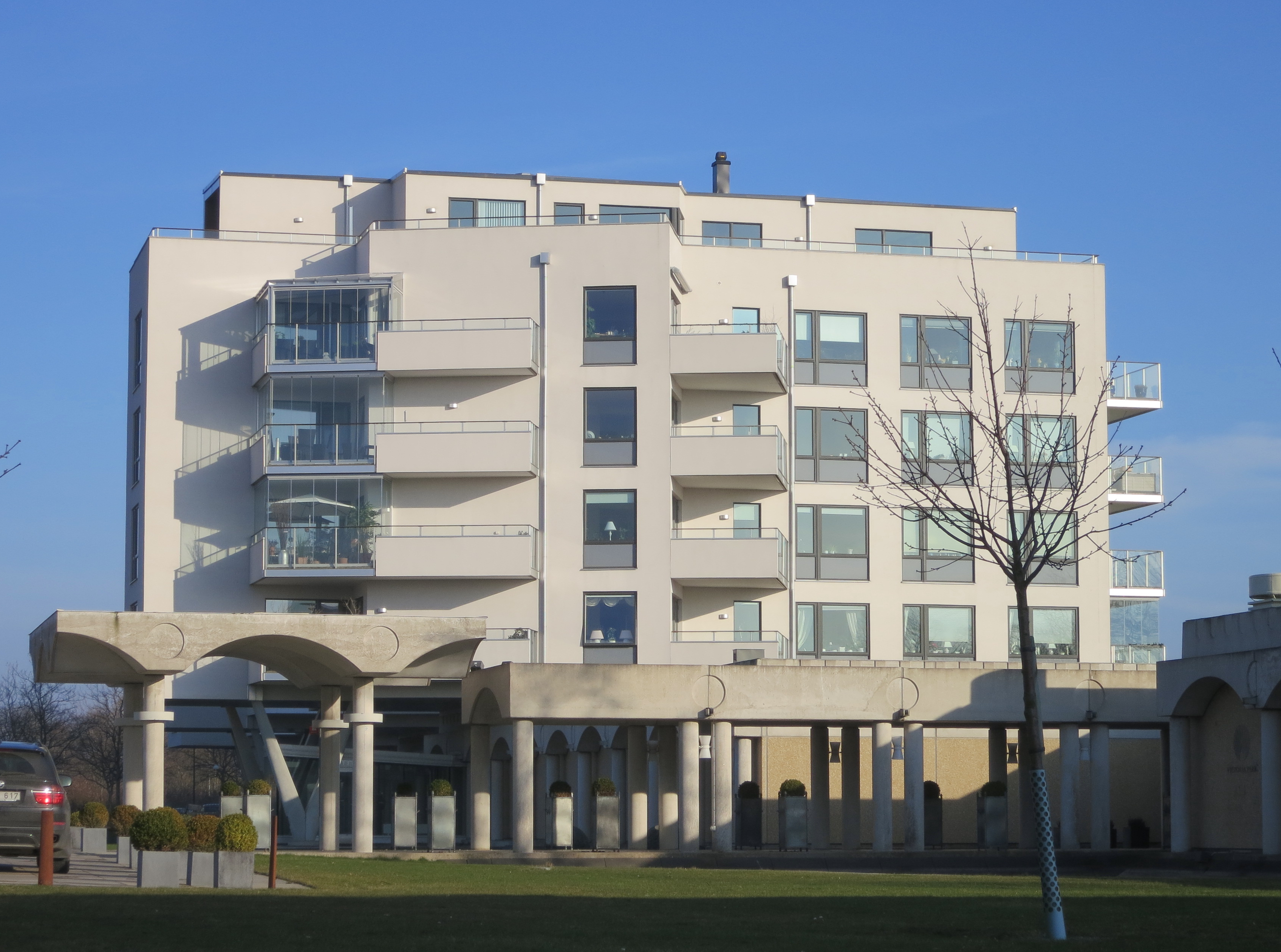 Victoria Park, Malmö